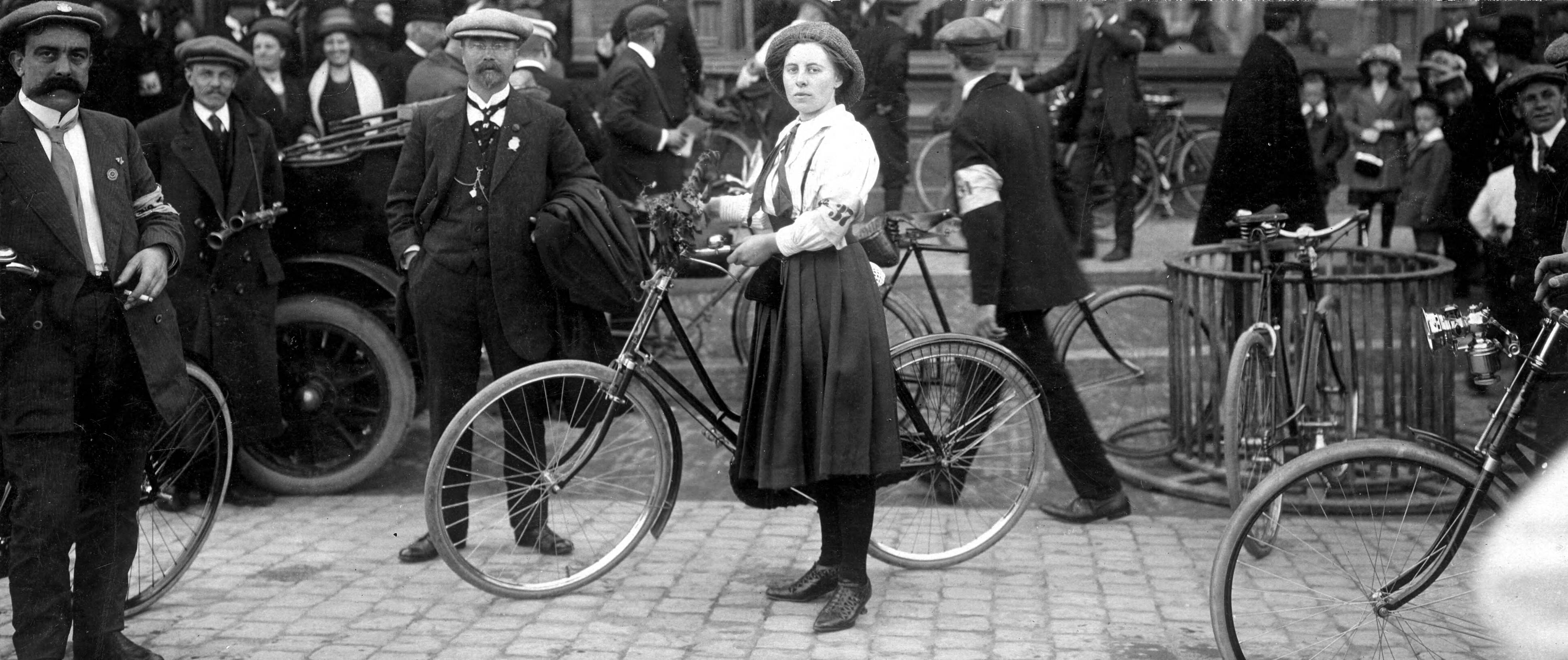 Mej. Van Goslinga uit Bolsward komt als eerste aan in Leeuwarden tijdens de Elfstedentocht per fiets, 1913.